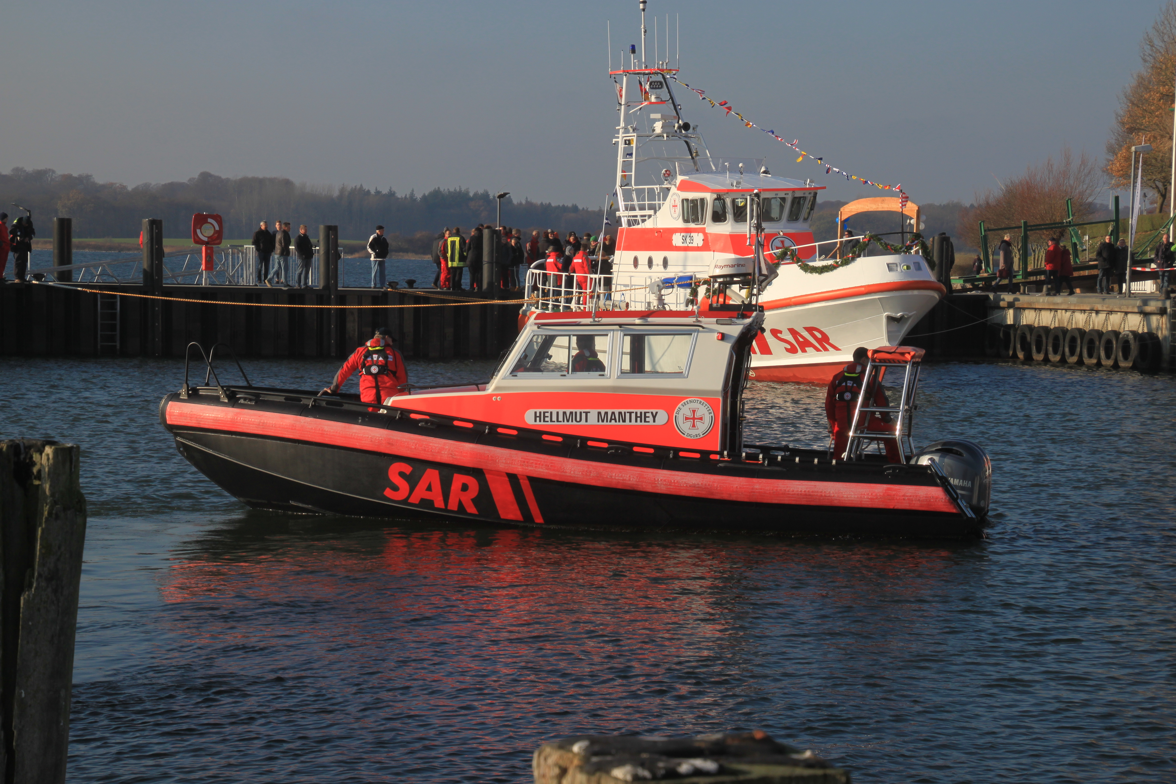 Das Seenotrettungsboot HELLMUT MANTHEY am 17.11.2018 im Fischereihafen Maasholm bei der Taufe des SRK FRITZ KNACK